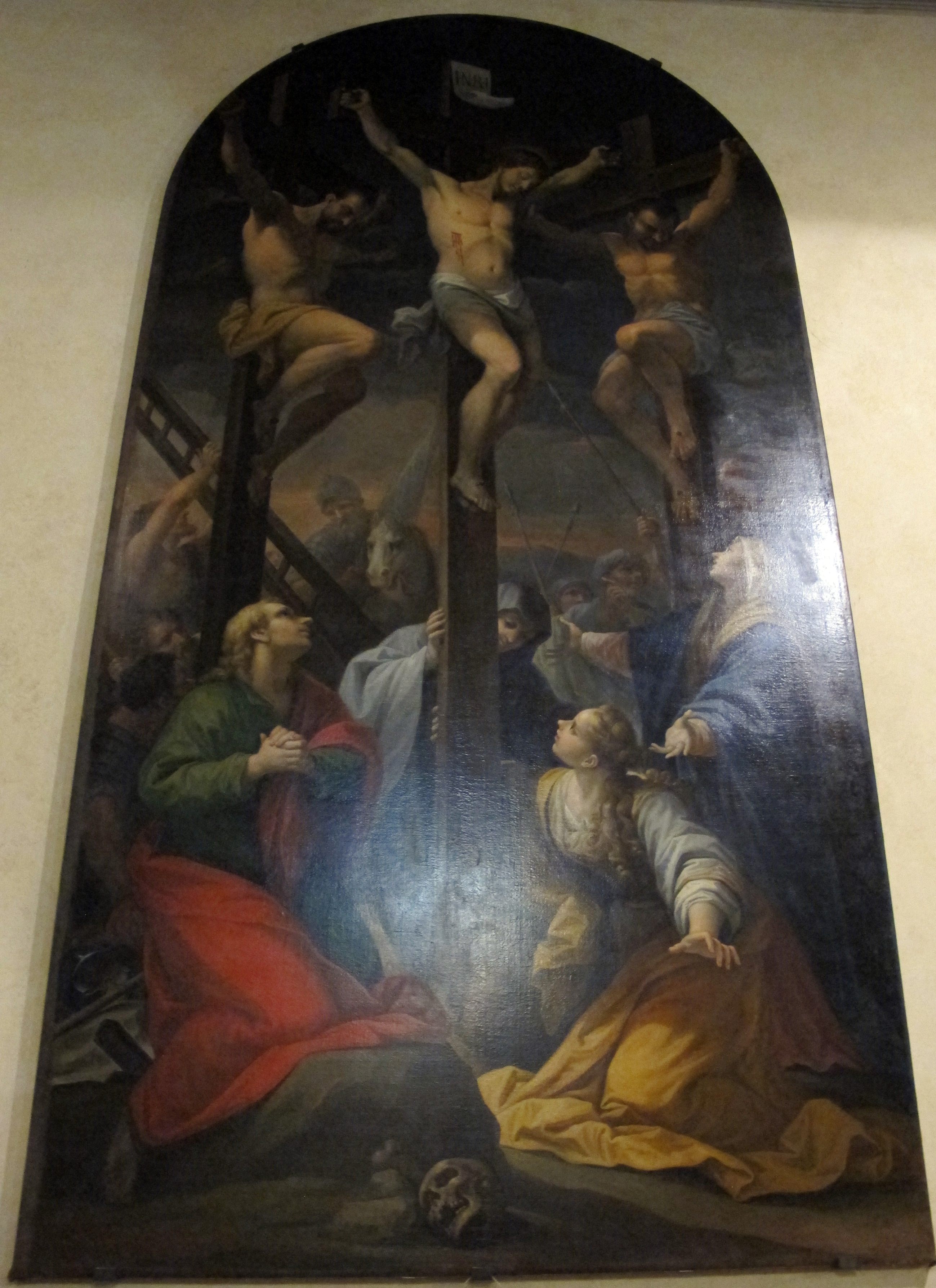 San Pietro in Mercato, Montespertoli